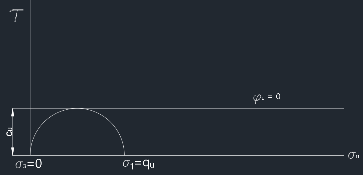 일축압축강도시험